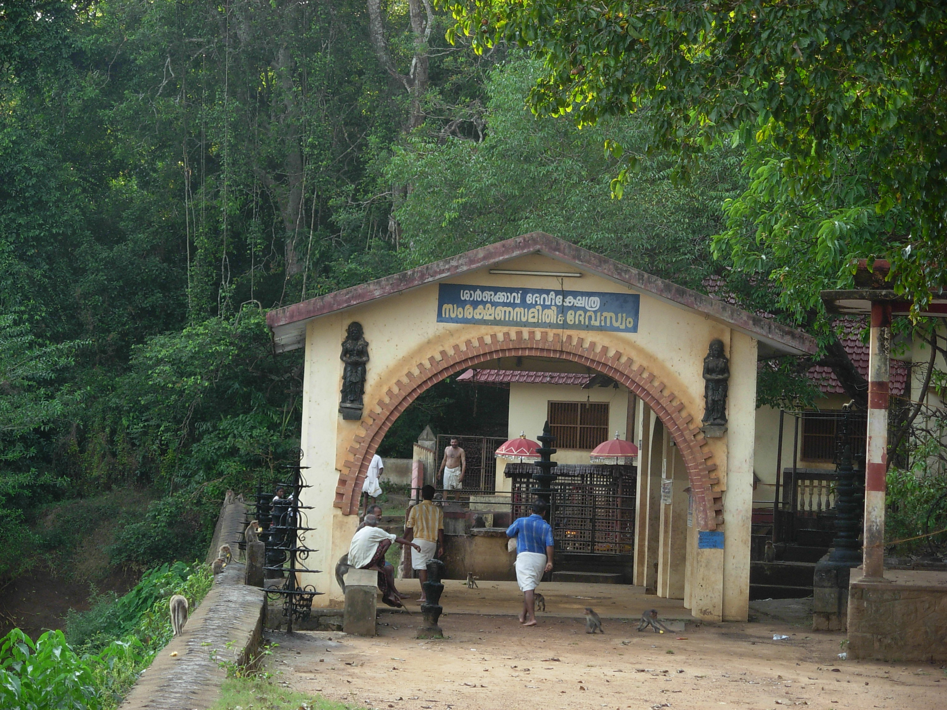 അച്ചങ്കോവിലാറിന്റെ തീരത്തുള്ള വെണ്മണിയിലെ ശാർങക്കാവ് ക്ഷേത്രം. ഇവിടുത്തെ വിഷു ഉൽസവം പ്രസിധമാണ്. ചാമക്കാവ് എന്നറിയപ്പെടുന്ന ശാർങക്കാവിൽ ധാരാളം കുരങ്ങുകൾ അധിവസിക്കുന്നു. കാക്കോത്തിക്കാവിലെ അപ്പൂപ്പൻ താടികൾ എന്ന മലയാള സിനിമ ചിത്രീകരിച്ചത് ഇവിടെയണ്.